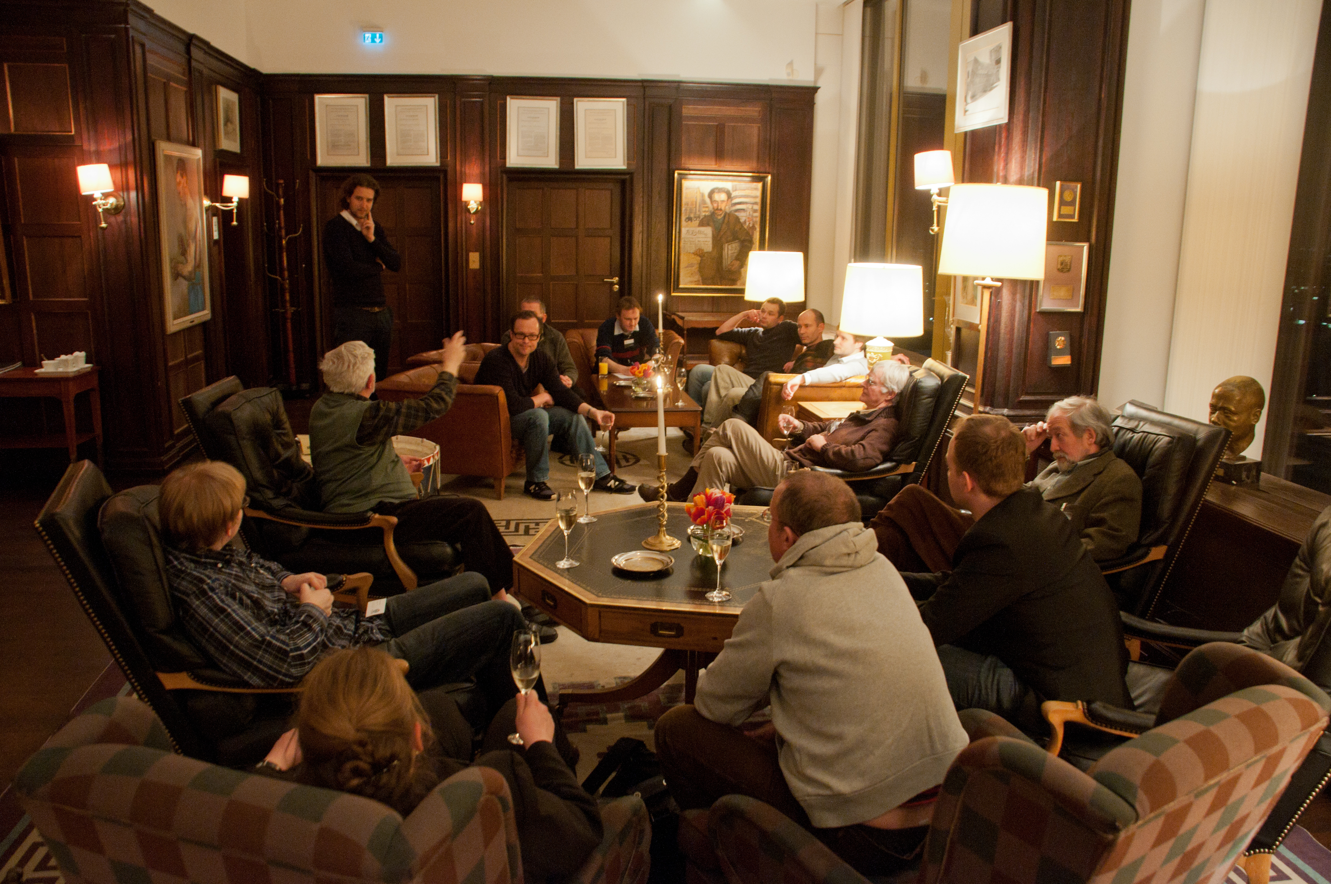 Wikipedia Stammtisch Berlin zu Besuch im Springer- Hochhaus